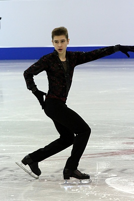 Иван Павлов (Украина) на чемпионате мира среди юниоров 2014